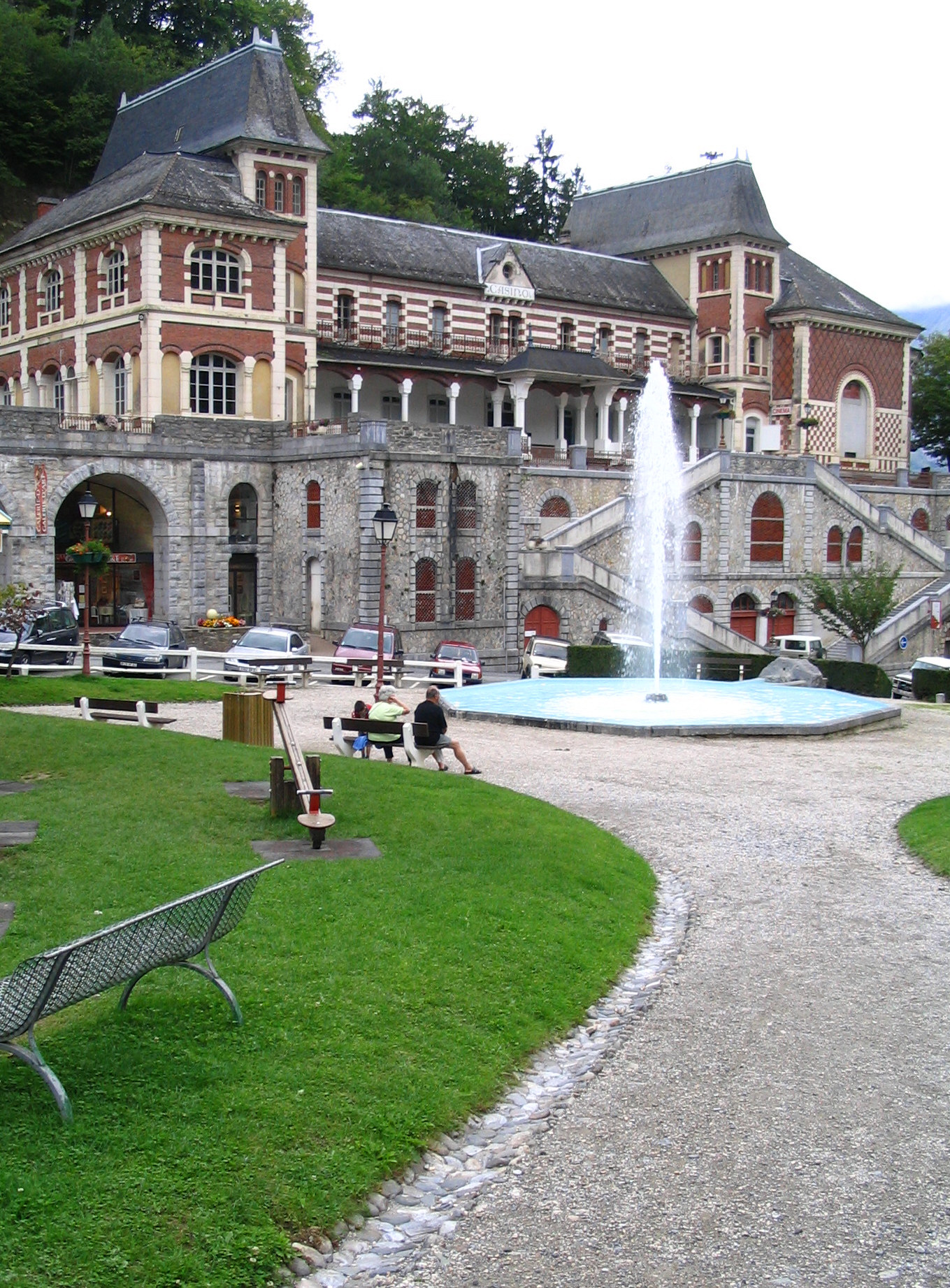 Casino des Eaux-Bonnes - vue générale Pyrénées Atlantiques Auteur: P.Charpiat - 2006